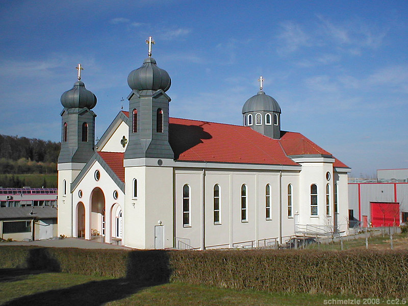 Syrisch-orthodoxe Kirche St. Gabriel in Kirchardt